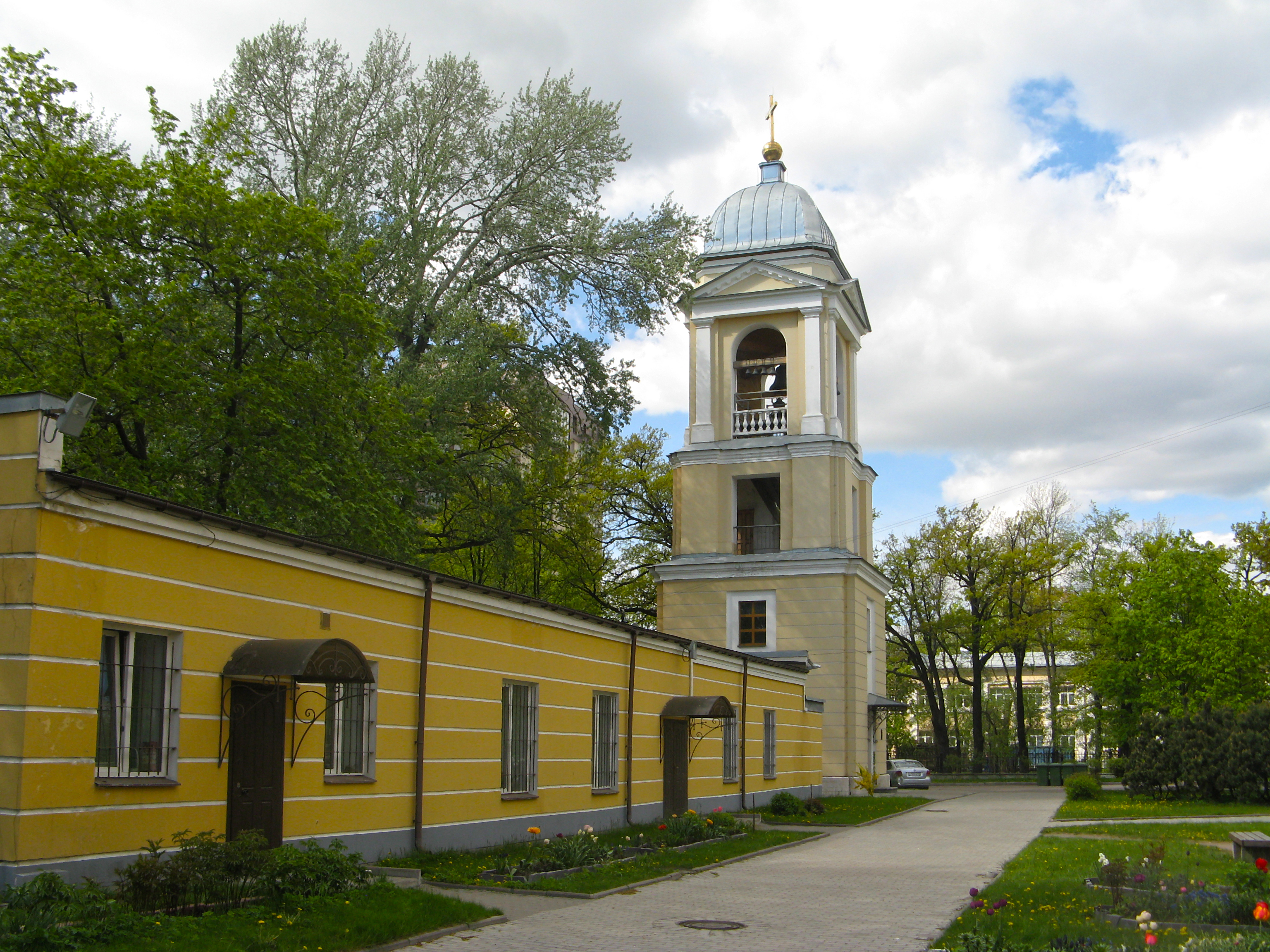 Колокольня и ризница: Приморский проспект, 79, Приморский район, Санкт-Петербург